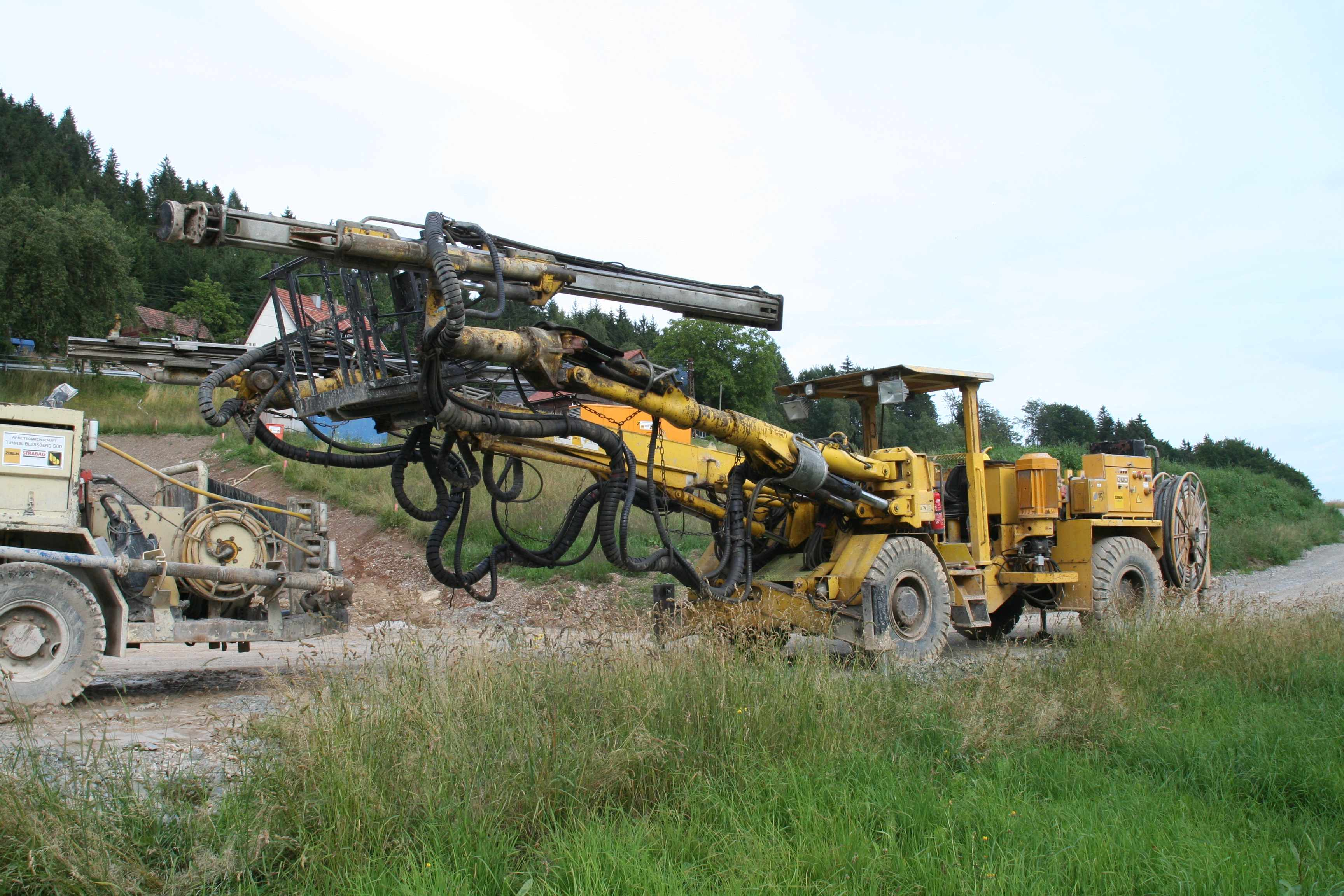 Bohrwagen für Tunnelbau Zur Herstellung von vorauseilenden Sicherungen (Spieße), für den Einau von Selbstbohrspießen, für das Bohren von Löchern in welchen Gebirgsanker verklebt oder Reibanker eingesetzt werden können und zur Herstellung der Bohrlöcher für die darauffolgende besetzung mit Sprengstoff im Sprengvortrieb.; SheepStyler